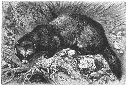 Bunzing (Putorius foetidus). Currently: Mustela putorius